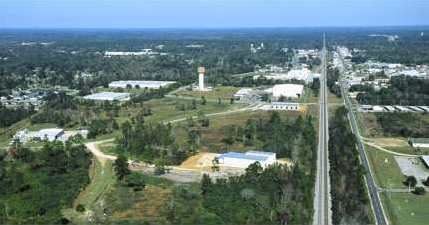 Picayune skyline